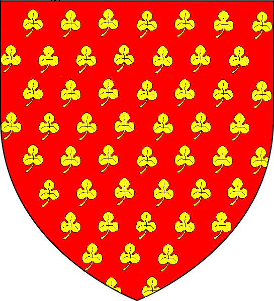 Blason de la famille Thiérrée (vieille famille du pays de Bray dont une branche changea son nom en celui de Campuley